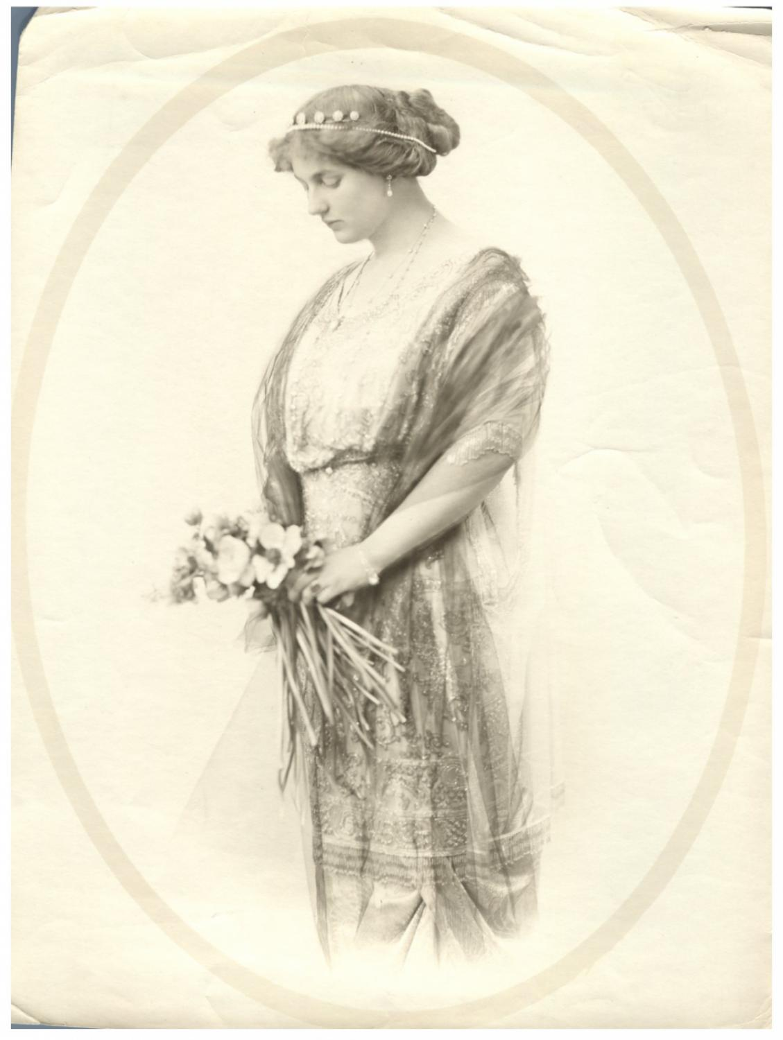 Prinzessin Alexandra Victoria von Schleswig-Holstein-Sonderburg-Glücksburg // Tirage argentique // 17x22 cm